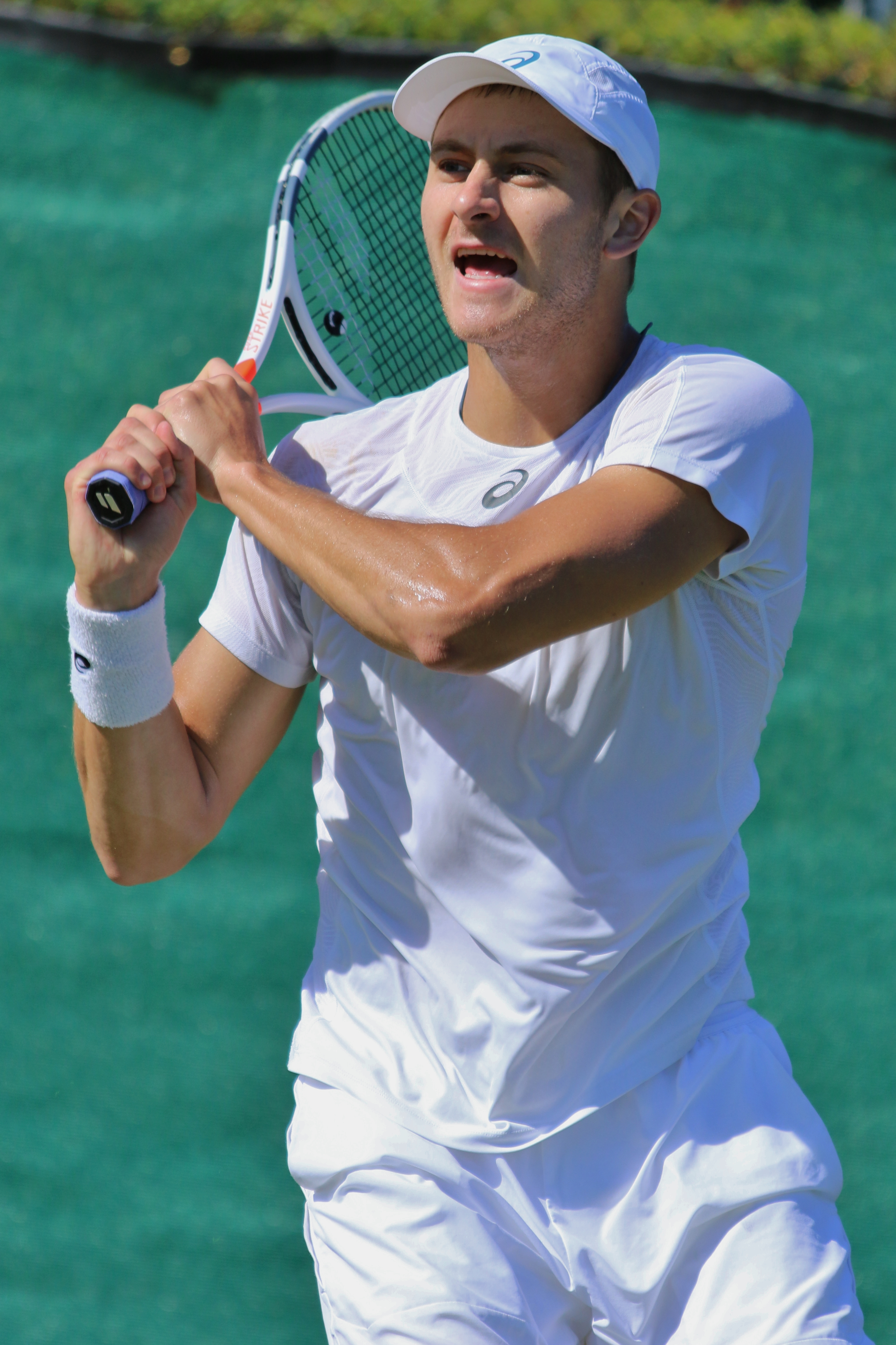 Schnur WMQ18 (4)